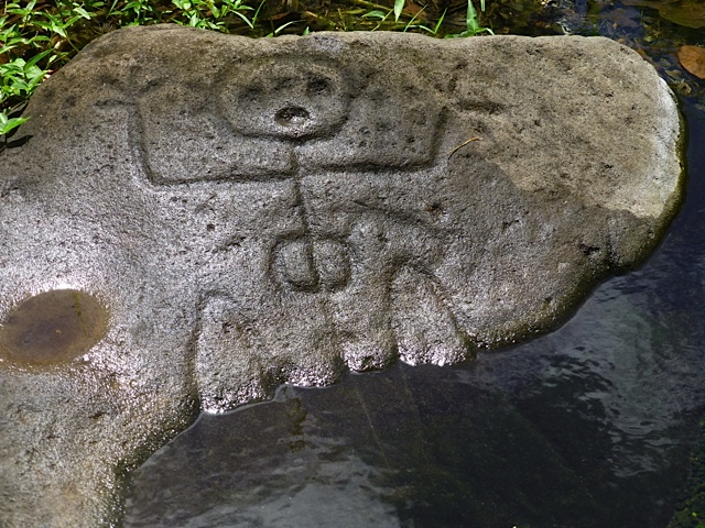 représentation par les Caraïbes d'une femme en train d'accoucher